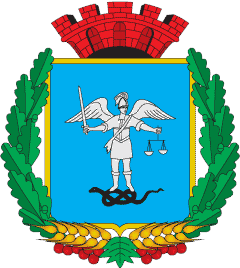 Герб Кролевецького району